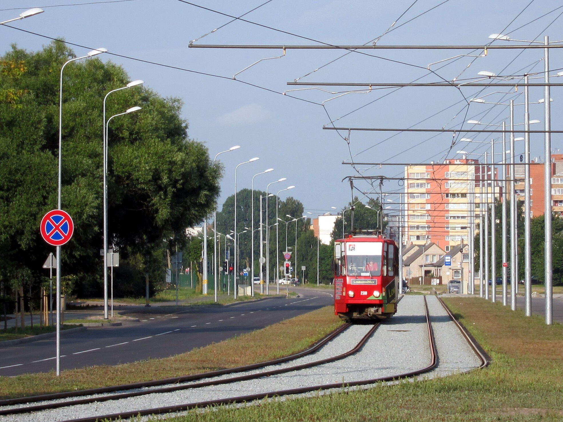 Tramvajs Liepājā, Tukuma ielā